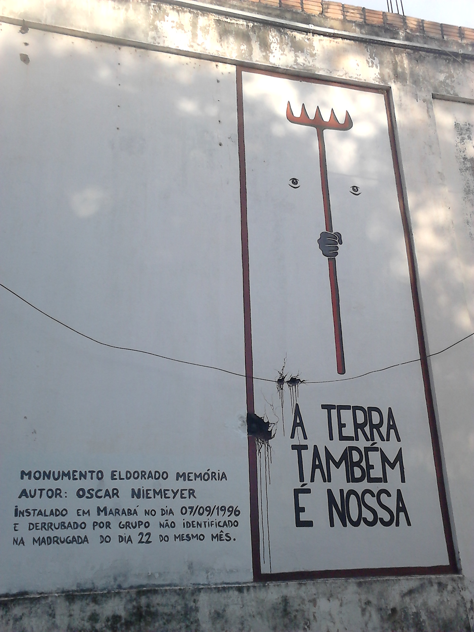 Imagem descritiva do Monumento Eldorado Memória, destruído em 1996.